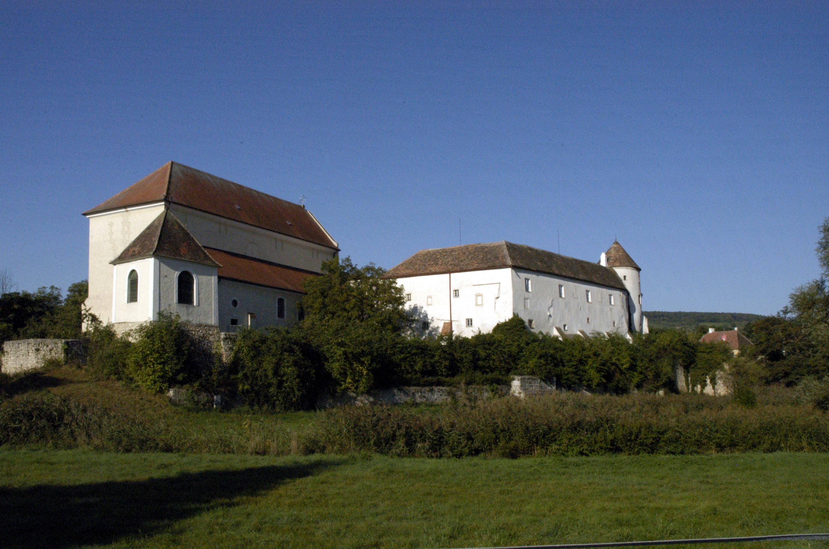 Schloss Mailberg mit Grabenanlage und Johannes-Nepomuk-Bildstock (Nordosttrakt mit Schlosskirche)